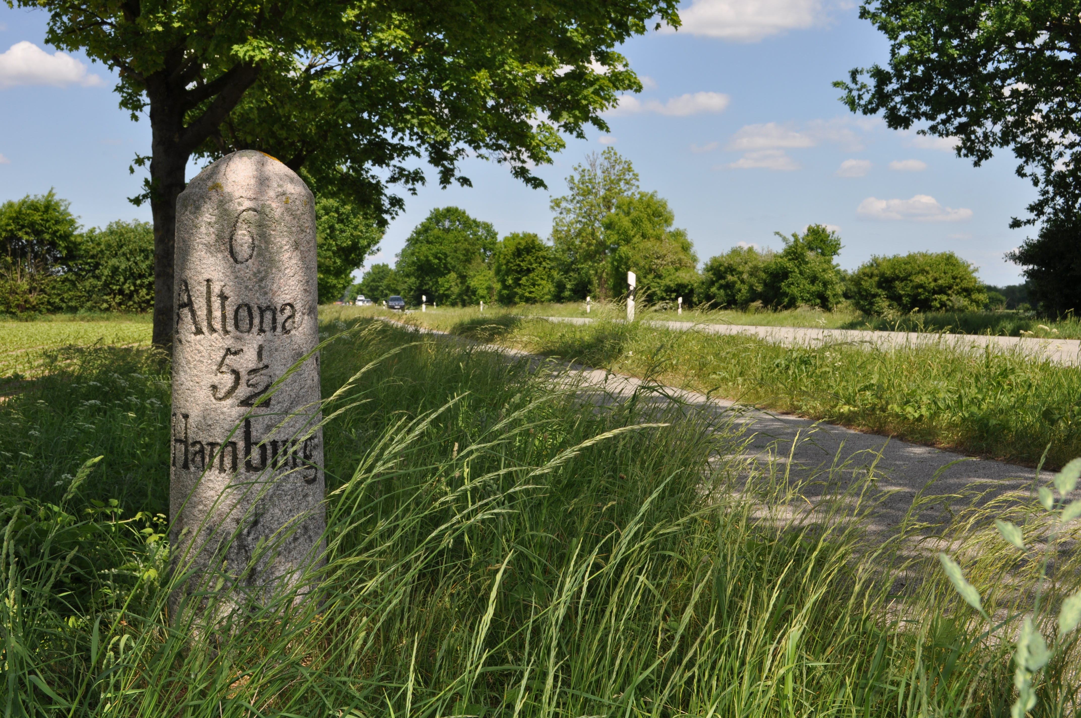 Vollmeilenstein an der Altona-Neustädter Chaussee in Groß-Niendorf. Entfernung nach Altona 6 Meilen (45 km), nach Hamburg 5½ Meilen (41 km) und nach Neustadt 6,95 Meilen (52 km). This is a photograph of an architectural monument.